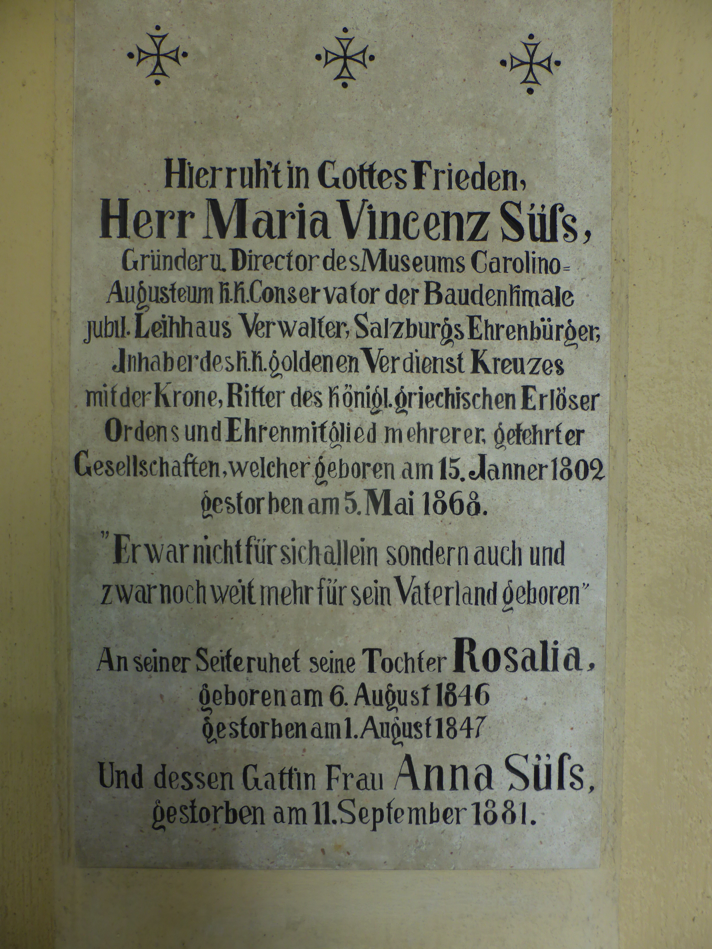 Epitaph von Maria Vinzenz Süss im SSebastianfriedhof Salzburg